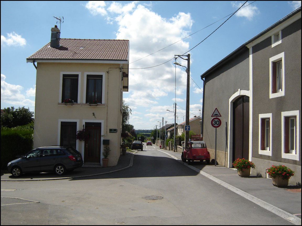 Maisons du vieux village, rue du Languedoc.